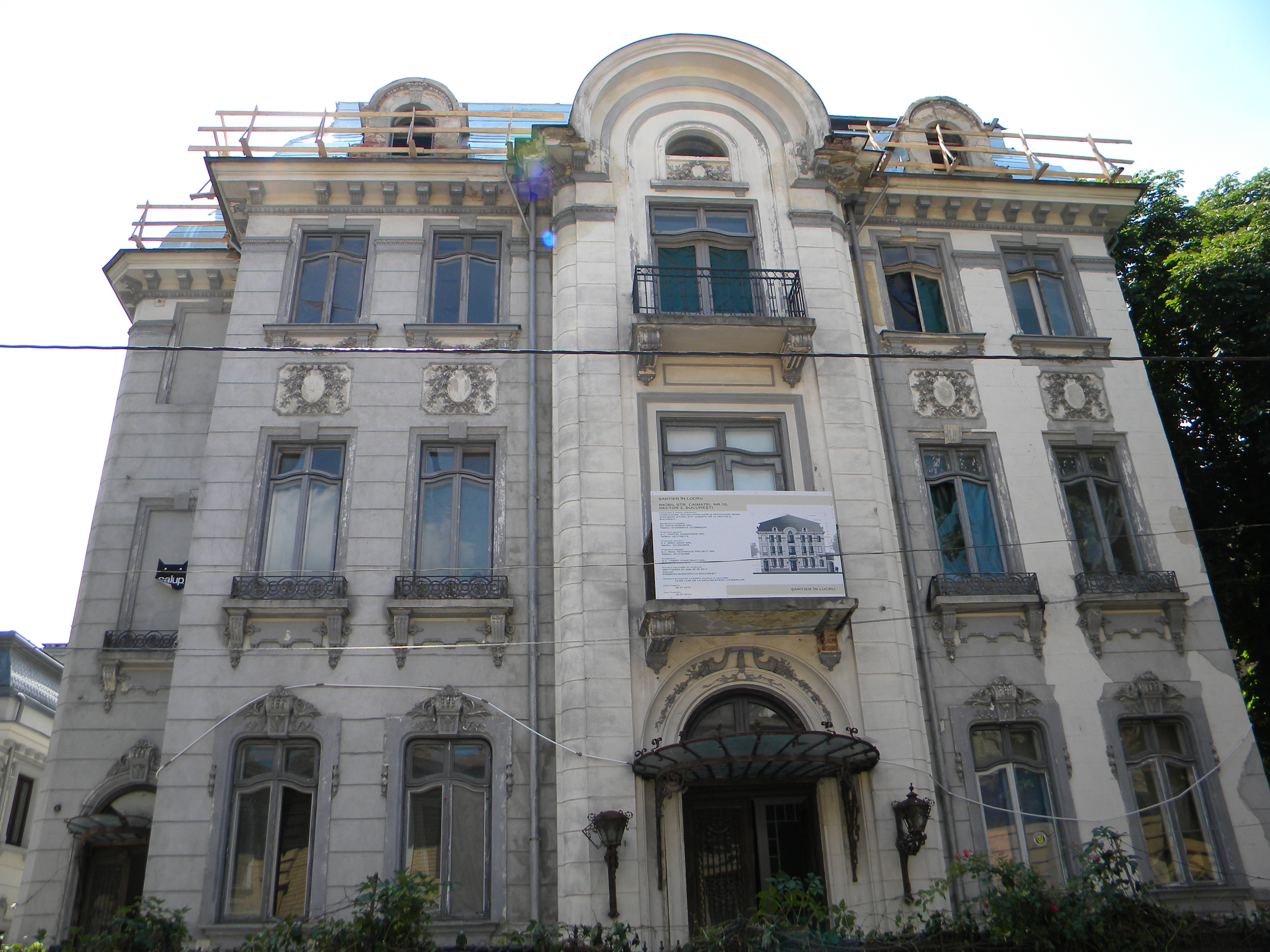 Bucuresti, Romania, Str. Caimatei nr. 10, sect. 2, B-II-m-B-18269